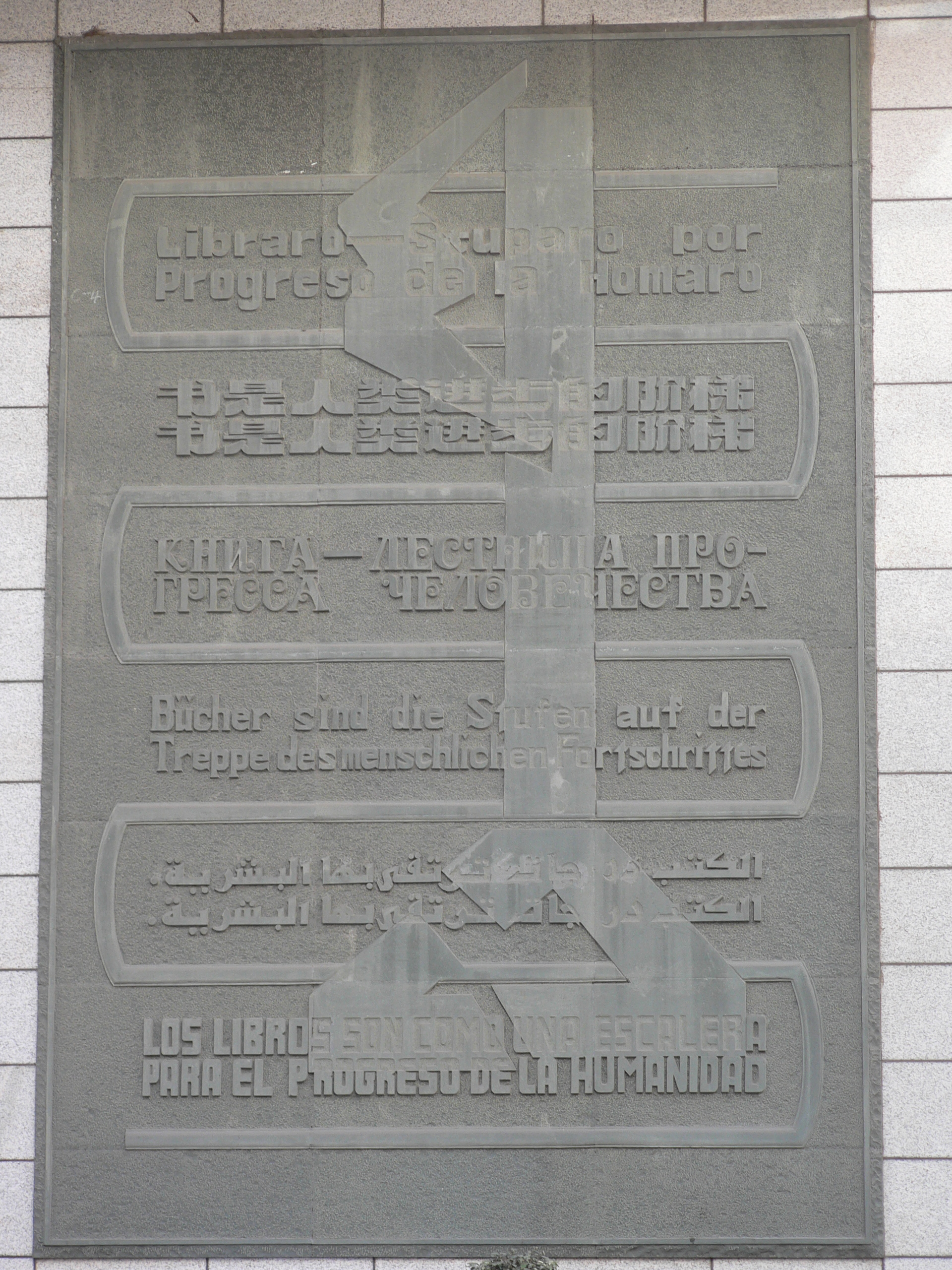 上海书城